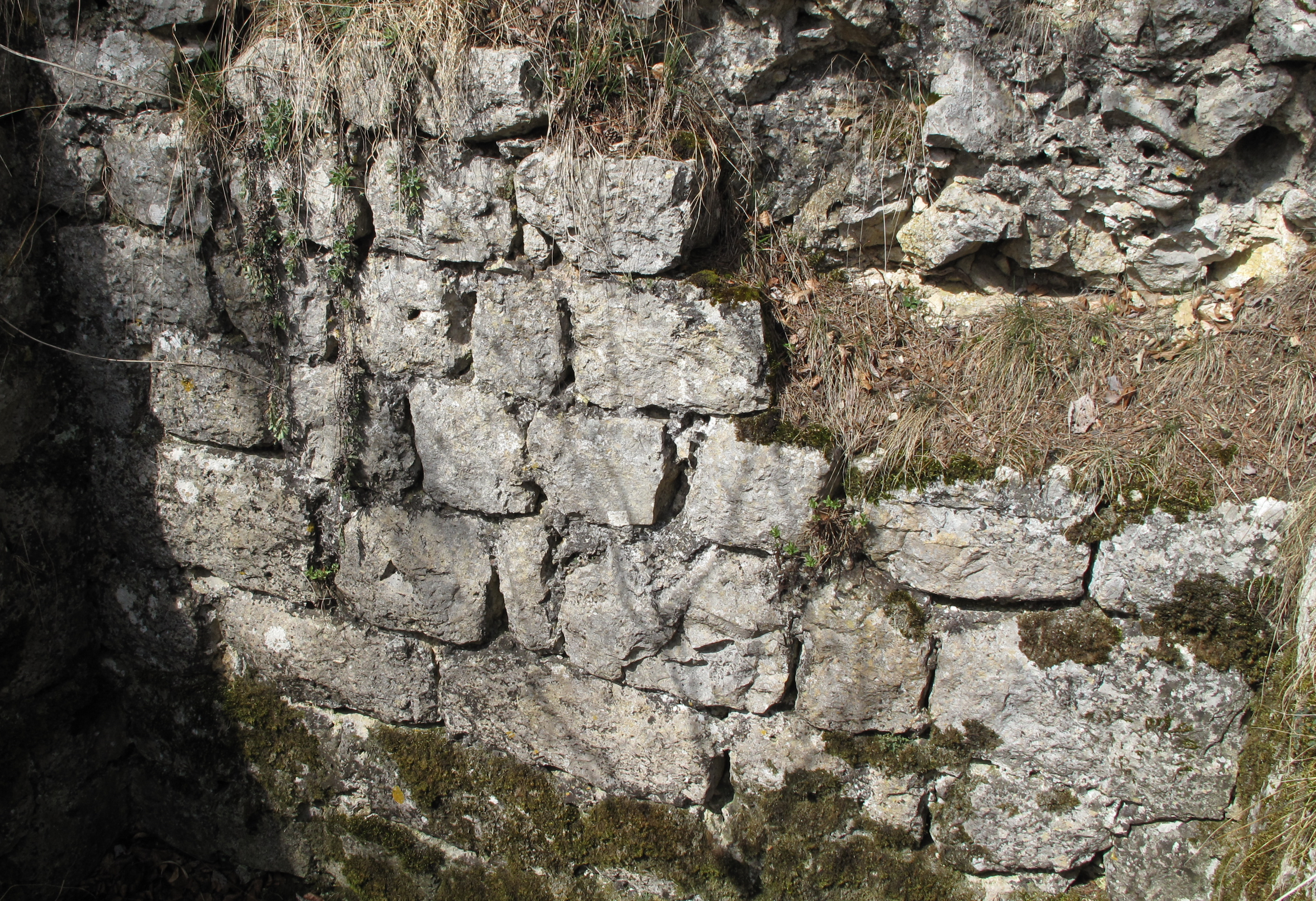 Kleinquader mit nach oben abnehmenden Größen zeigen Bereiche des erhaltenen Innenwandverbandes; Quaderabmessungen z.B. 58x32, 35x32, 38x25 cm.